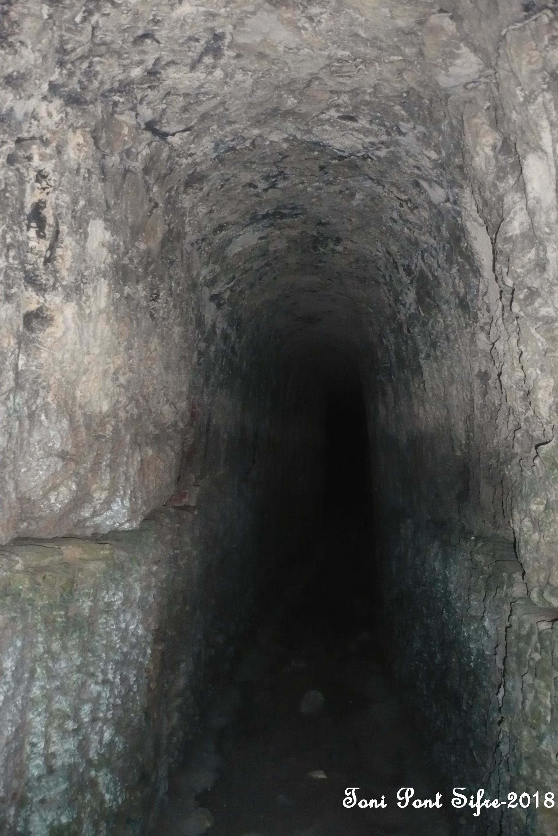 Galeria de desguas del Fondet de la Senieta a l'Altet